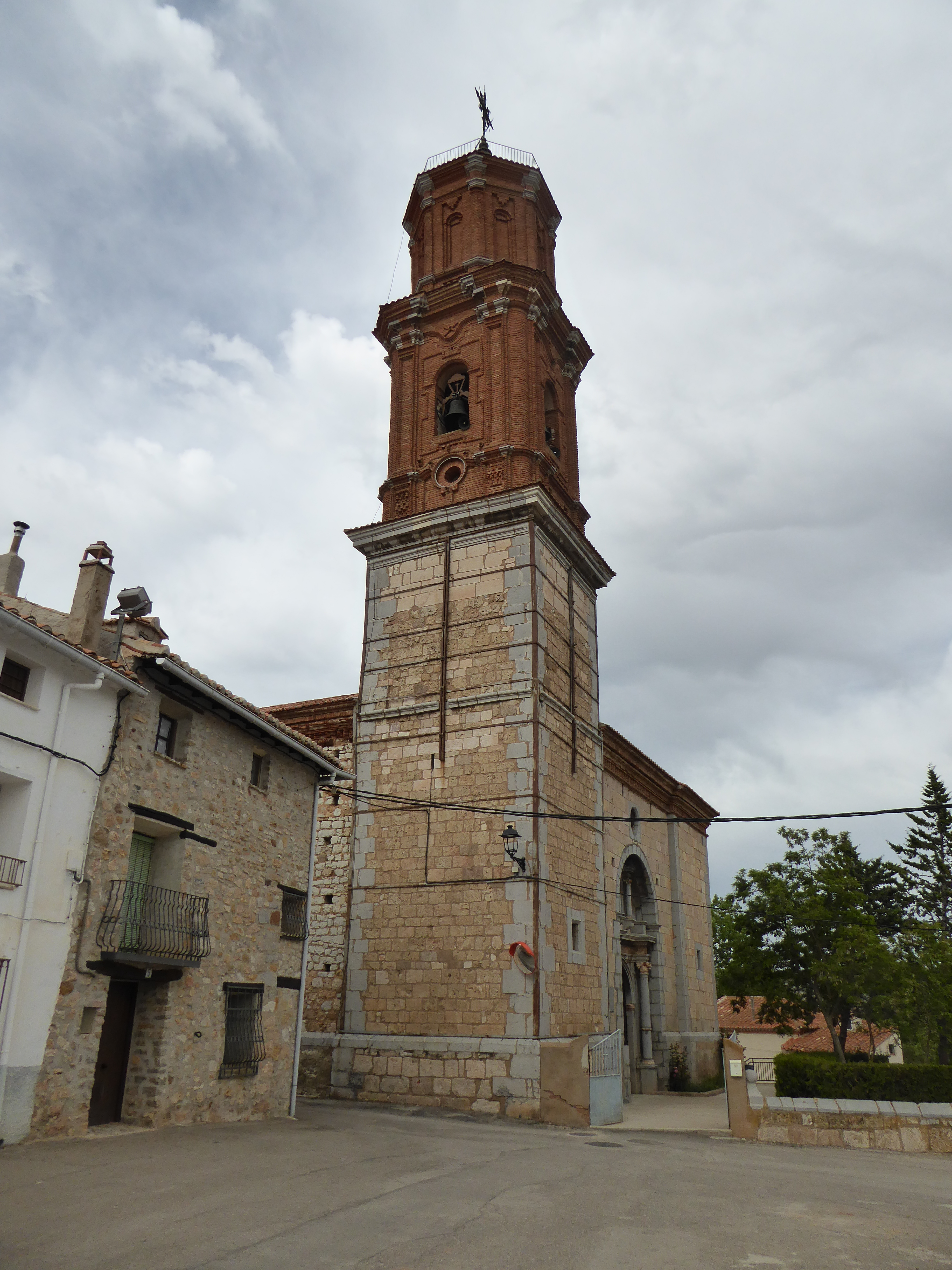 Iglesia de Santo Domingo de Silos